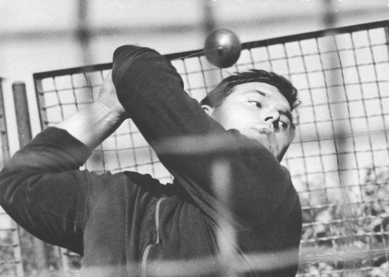 Manfred Losch Zentralbild Kluge 30.04.1967 Leipzig: Leichtathletik - Bahneröffnung Manfred Losch gewann das Hammerwerfen mit 61,62 m. Die beste Leistung in den technischen Disziplinen bei der Leichtathletik-Bahneröffnung des SC Leipzig am 29.04.1967 im Leipziger Stadion des Friedens vollbrachte Hammerwerfer Manfred Losch (SC DHfK Leipzig). Er warf fünfmal über 60 m und siegt mit 61,62 m. Abgebildete Personen: Losch, Manfred: Hammerwerfer, DDR